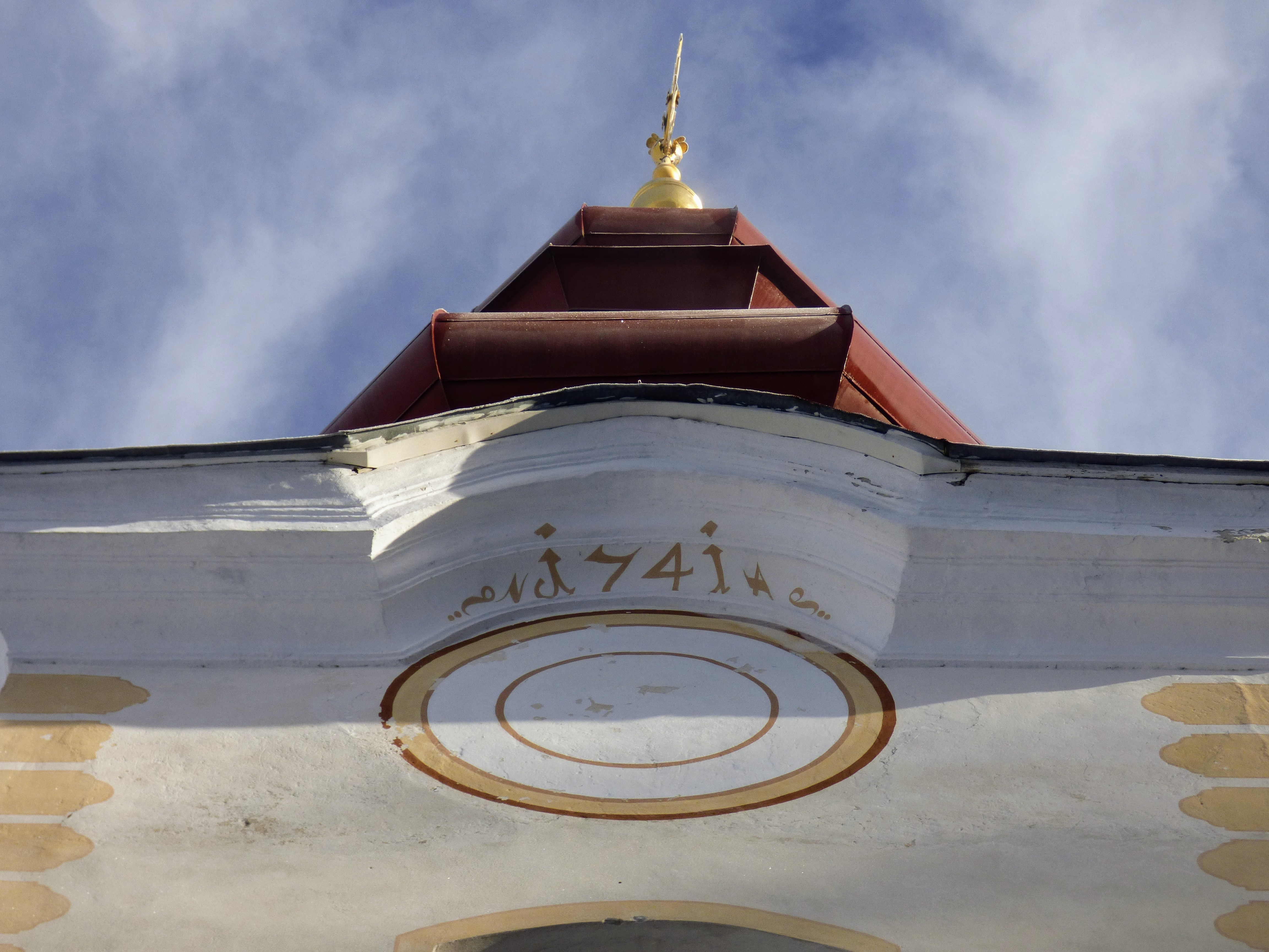 Inschrift 1741 auf Turm der Filialkirche St. Stefan bei Straßburg, Kärnten